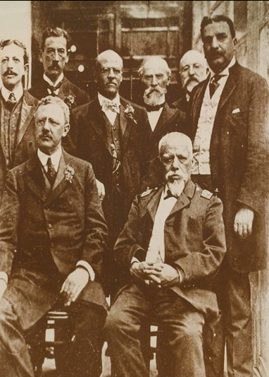 Alfaro convoca 2 asambleas luego del Incendio